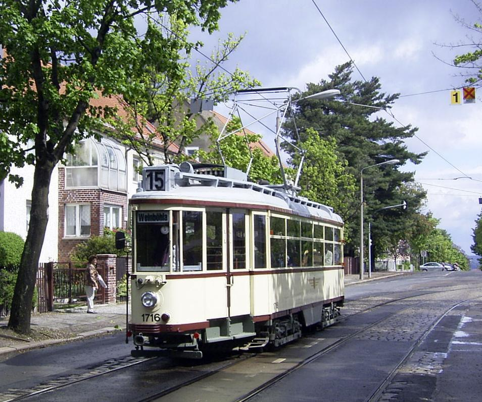 Großer Hechttriebwagen in Dresden im Jahr 2005, Bernhardstraße 152